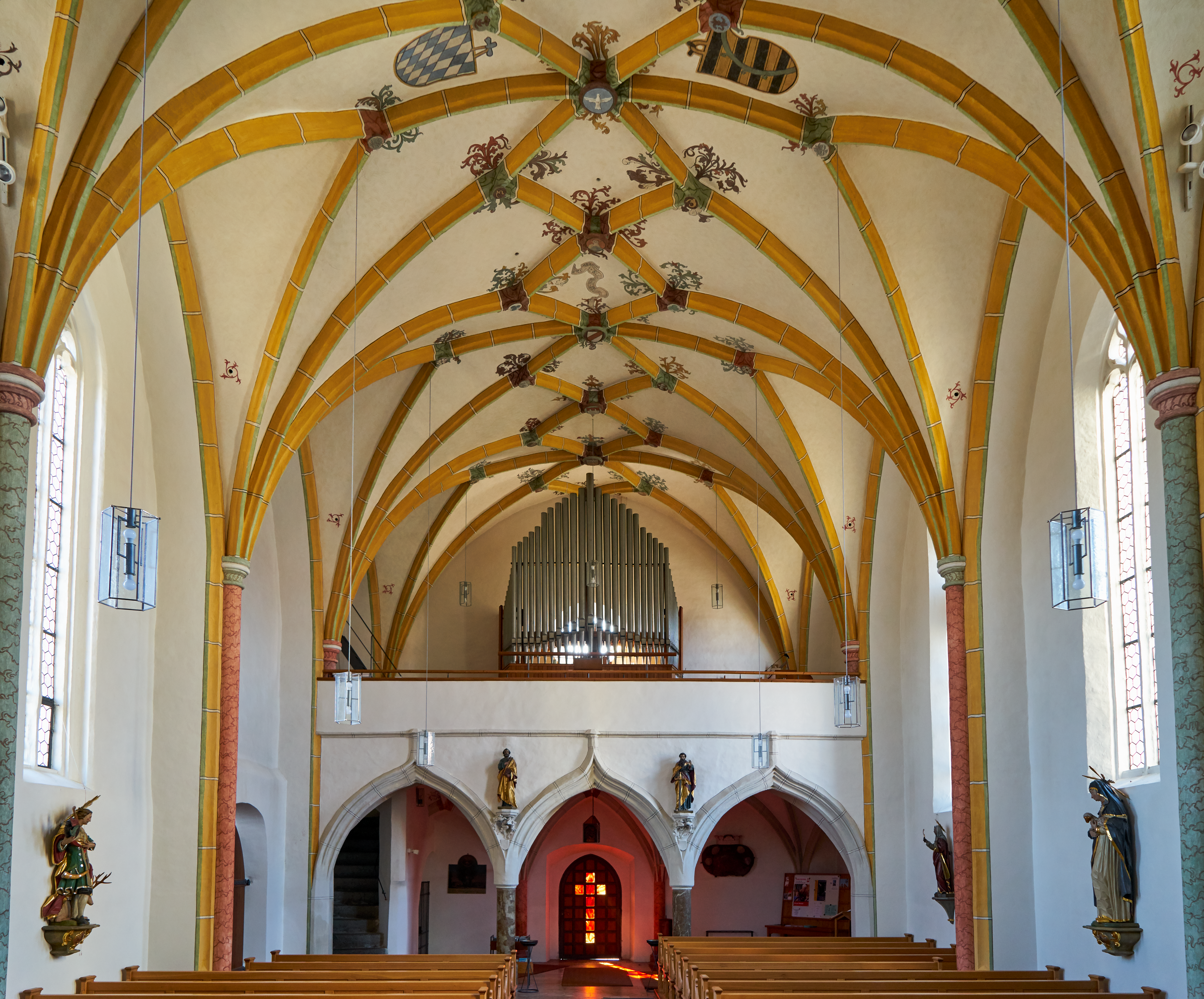 Kath. Pfarrkirche Mariä Himmelfahrt, Saalkirche mit Polygonalchor, Chorflankenturm, zweigeschossiger Sakristei und offener Vorhalle, spätgotisch, spätes 15. Jh. (bez. 1461), am Langhaus Hochwassermarke des Passauer Typs von 1501; mit Ausstattung; Friedhofsmauer aus Tuffstein, wohl 16./17. Jh.